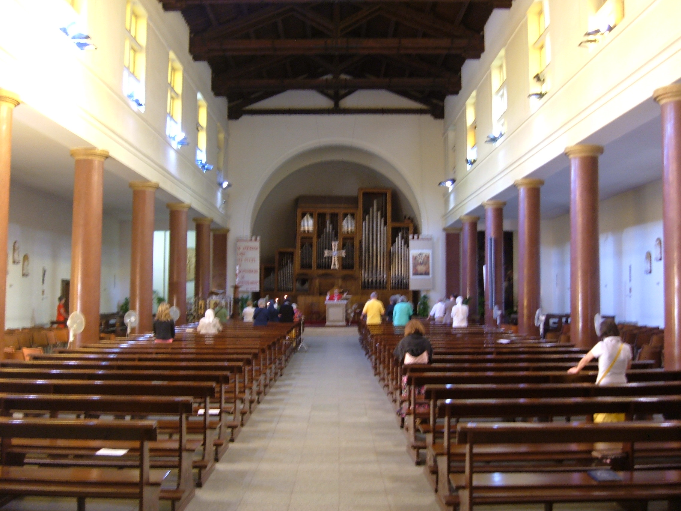 Chiesa di Santa Galla, a Roma, nel quartiere Ostiense, in circonvallazione Ostiense.